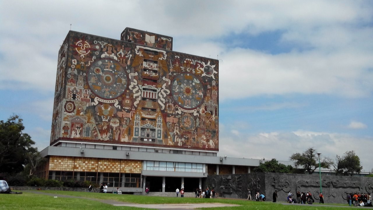 La hermosa biblioteca central en UNAM